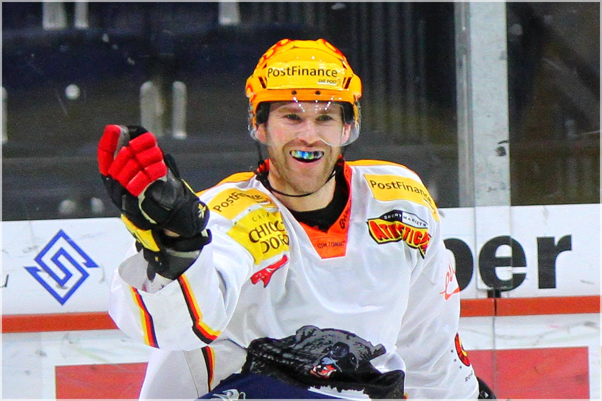 Christian Dubé avec le maillot du CP Berne